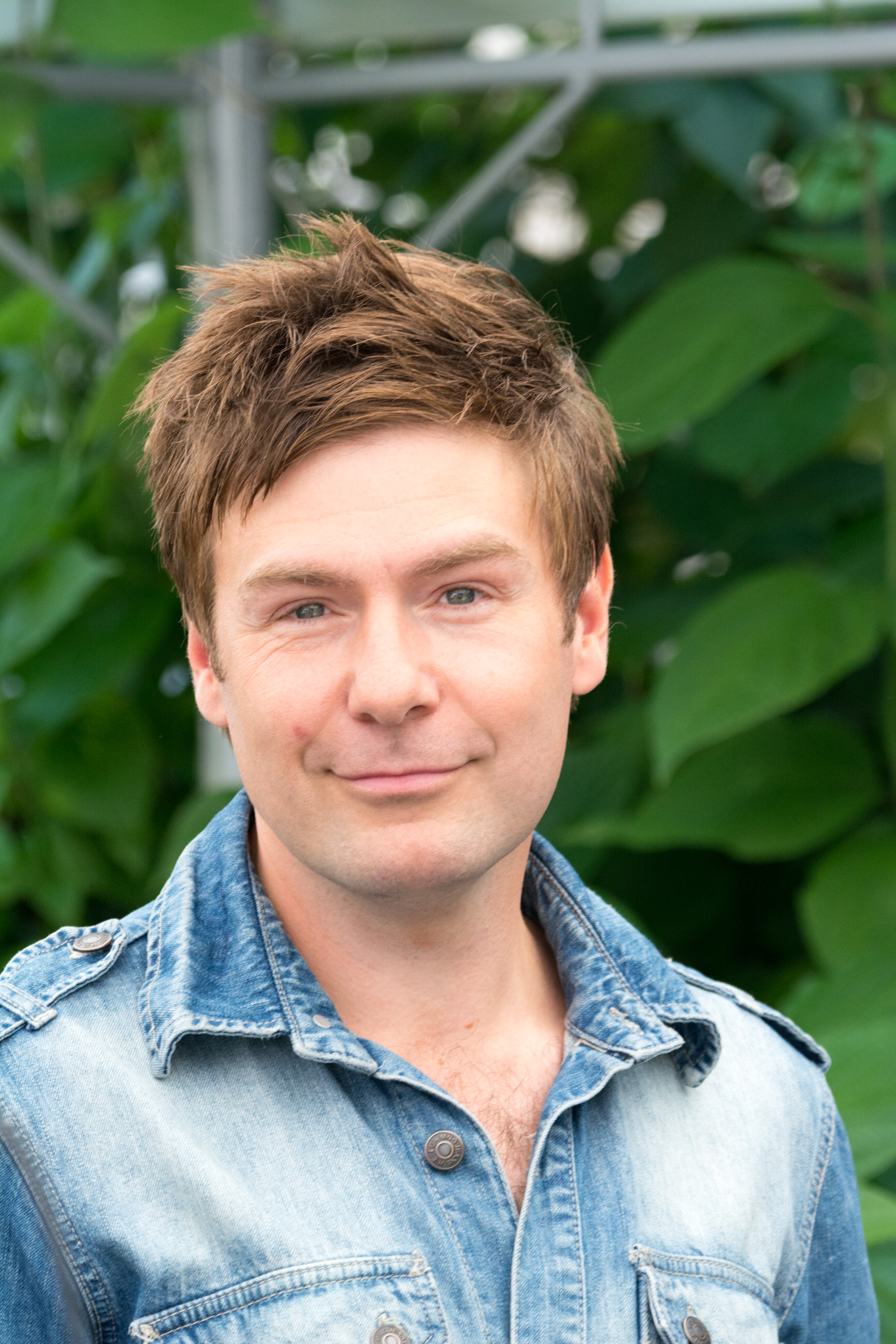 Thomas Lundin suomalainen radio ja tv-juontaja, laulaja ja näyttelijä